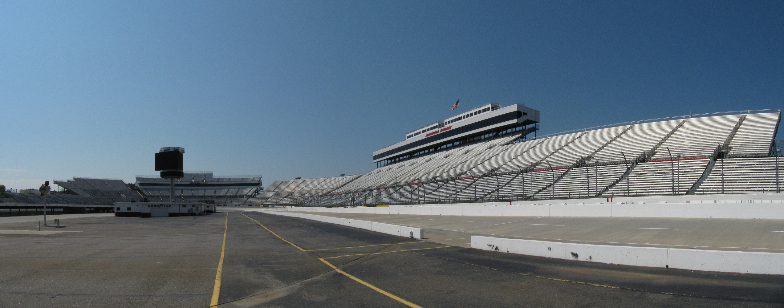 Sicht aus dem Infield auf die Haupttribüne und in Richtung der Kurven 1 und 2.